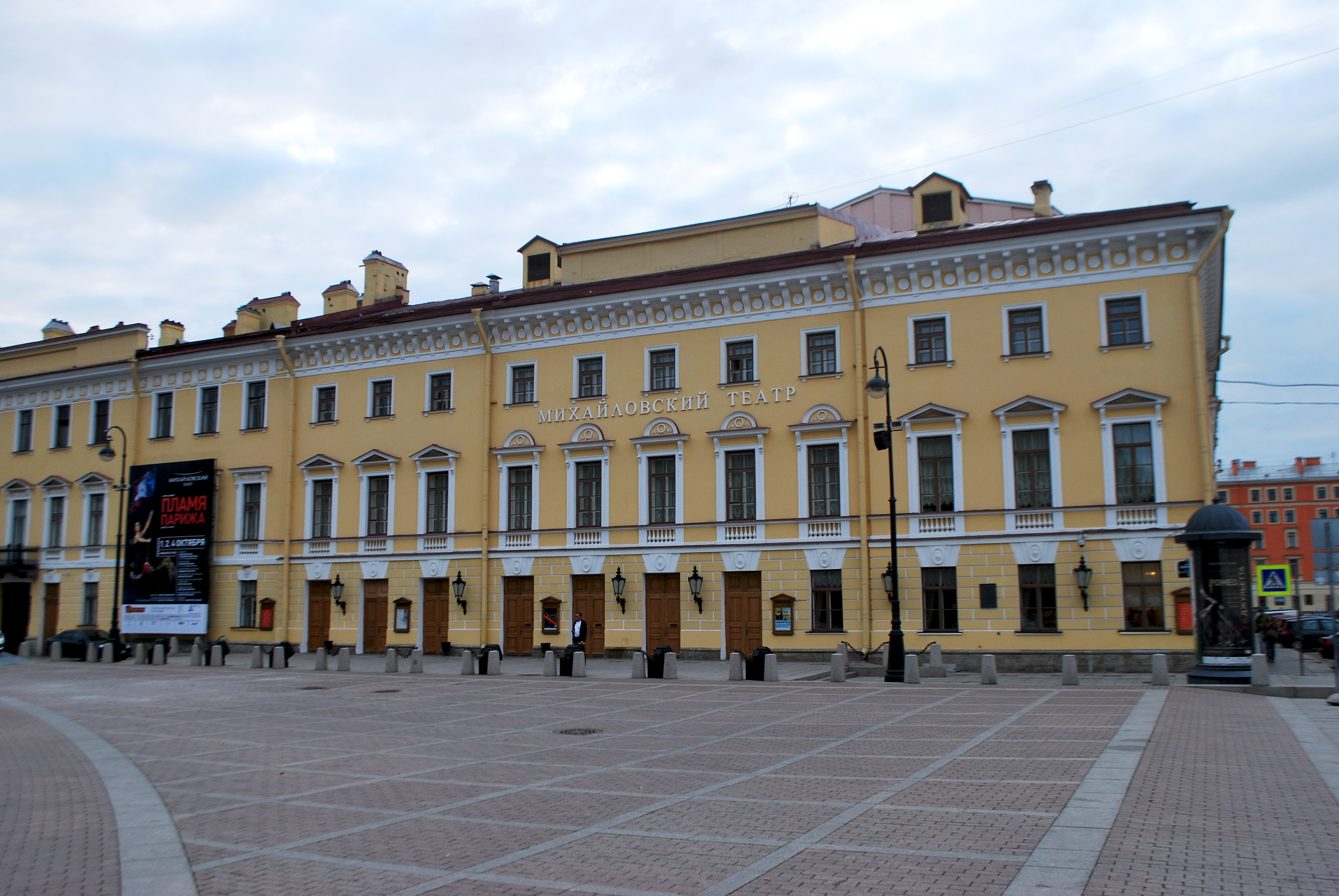 Театр Михайловский (Санкт-Петербург и Лен.область, Санкт-Петербург, Искусств площадь, 1, Инженерная улица, 1, канала Грибоедова наб., 4)